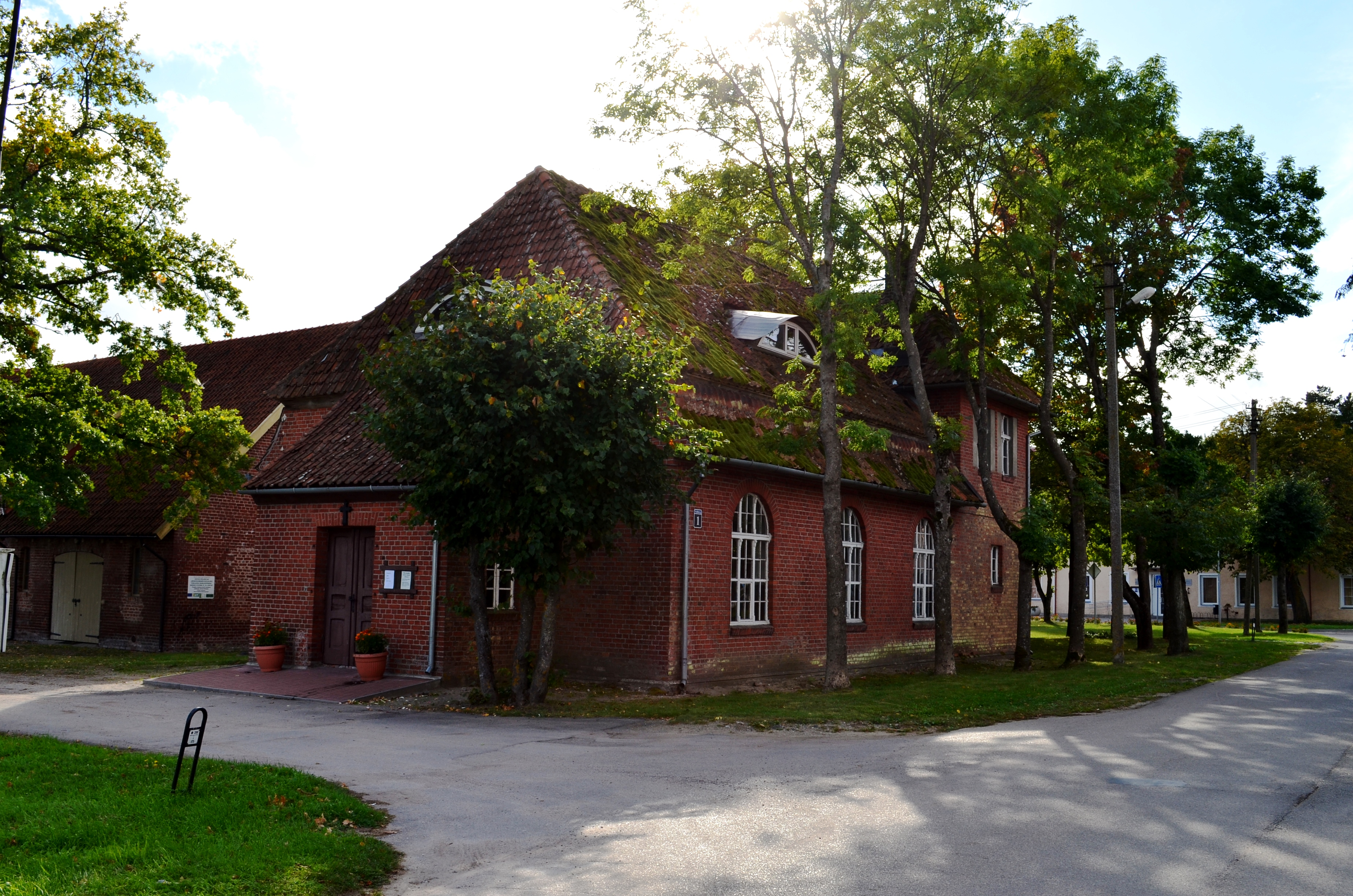 Kintų dab. liuteronų bažnyčia, Šilutės raj.